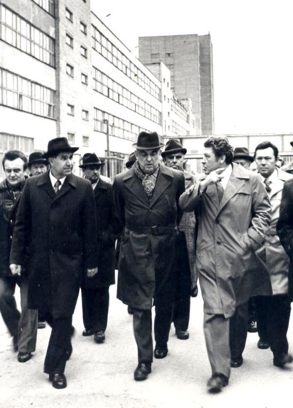 Первый секретарь Псковского обкома КПСС А. М. Рыбаков (впереди слева), министр электротехнической промышленности СССР А. К. Антонов (в центре) и директор Псковского завода тяжёлого электросварочного оборудования А. В. Лукин. Фотография сделана в ходе посещения в 1979 году министром электротехнической промышленности СССР А. К. Антоновым Псковского завода тяжёлого электросварочного оборудования.